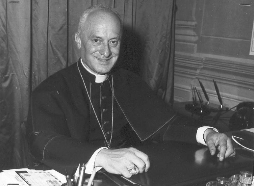 Sergio Pignedoli Description: Roma:Il Cardinale Agagianian presenta S.E. Mons. Sergio Pignedoli. - Il nuovo Segretario nel suo ufficio Ort: Vatikan